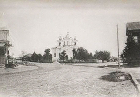 Беларуская (тарашкевіца): Чэрыкаў (Čerykaŭ), пляц Рынак (plac Rynak). Царква-мураўёўка